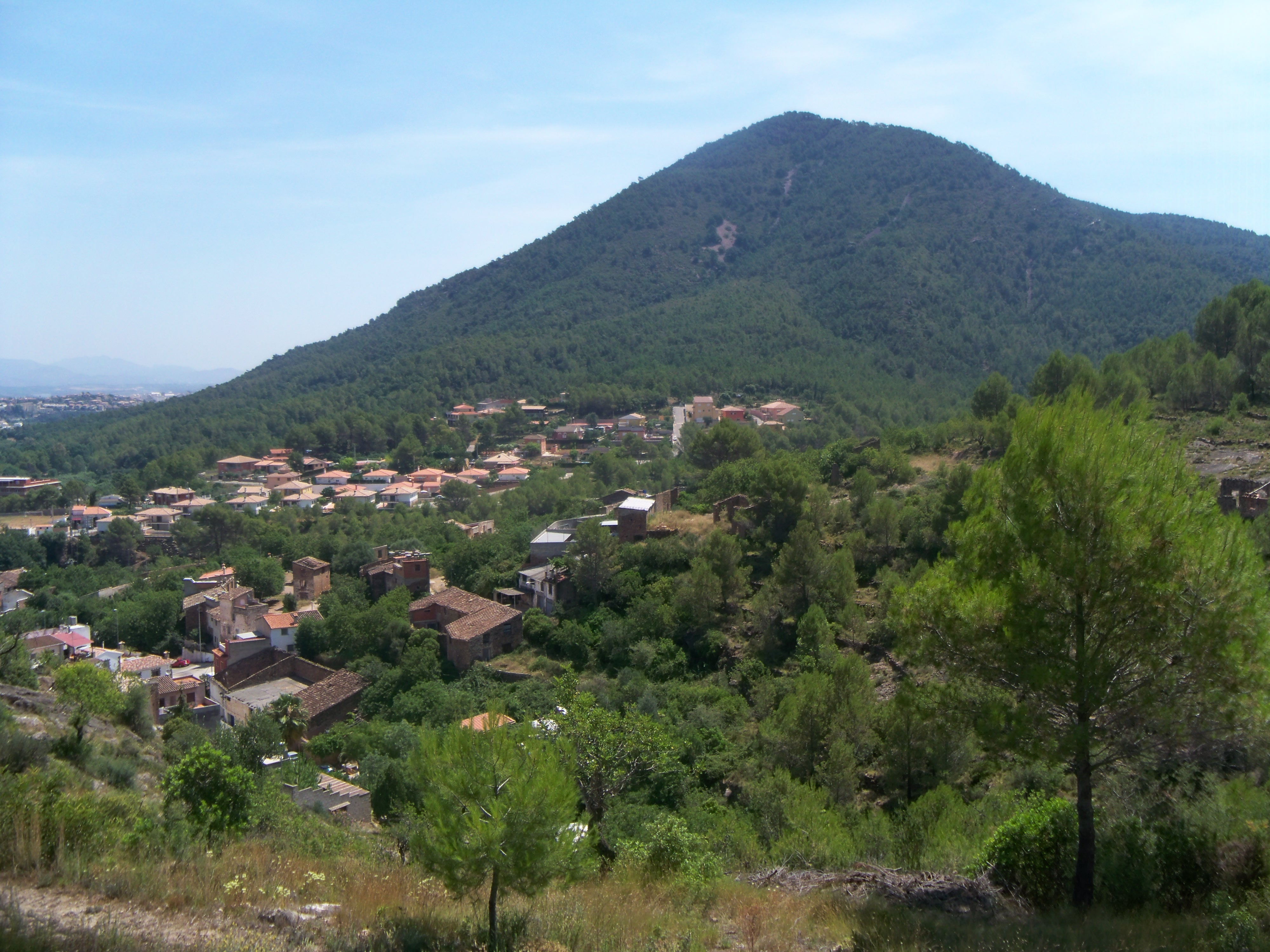 El Montí y la falda. Tales (Castellón)